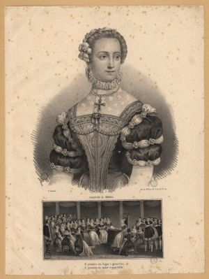 Gravure de l'infante Donna Marie de Portugal